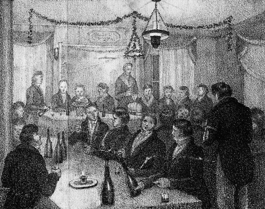 Une société lyrique (ou goguette) à Paris en 1826.